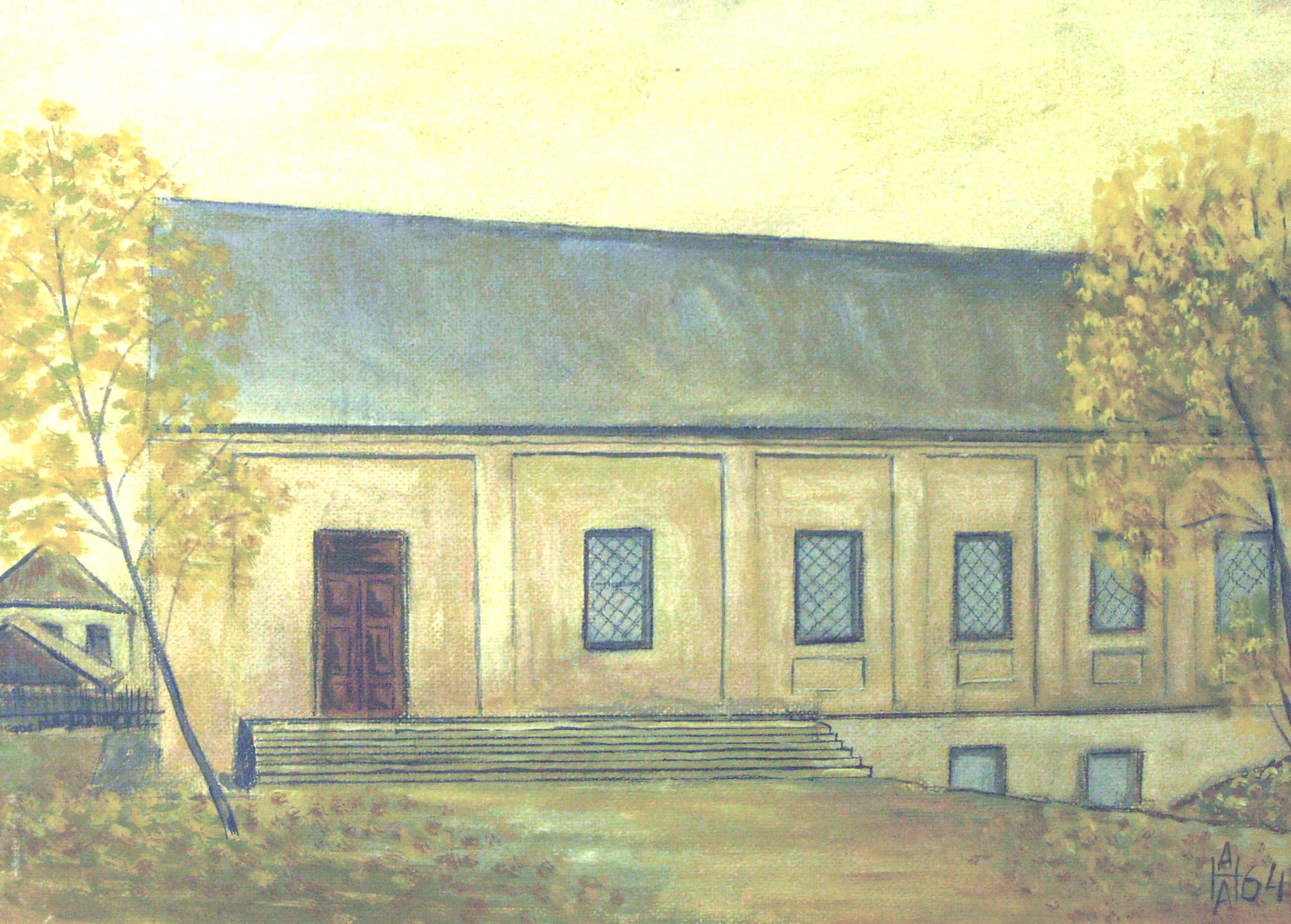 Воложин, иешива, 1964 год. Яичная темпера. Художник - Анатолий Наливаев.